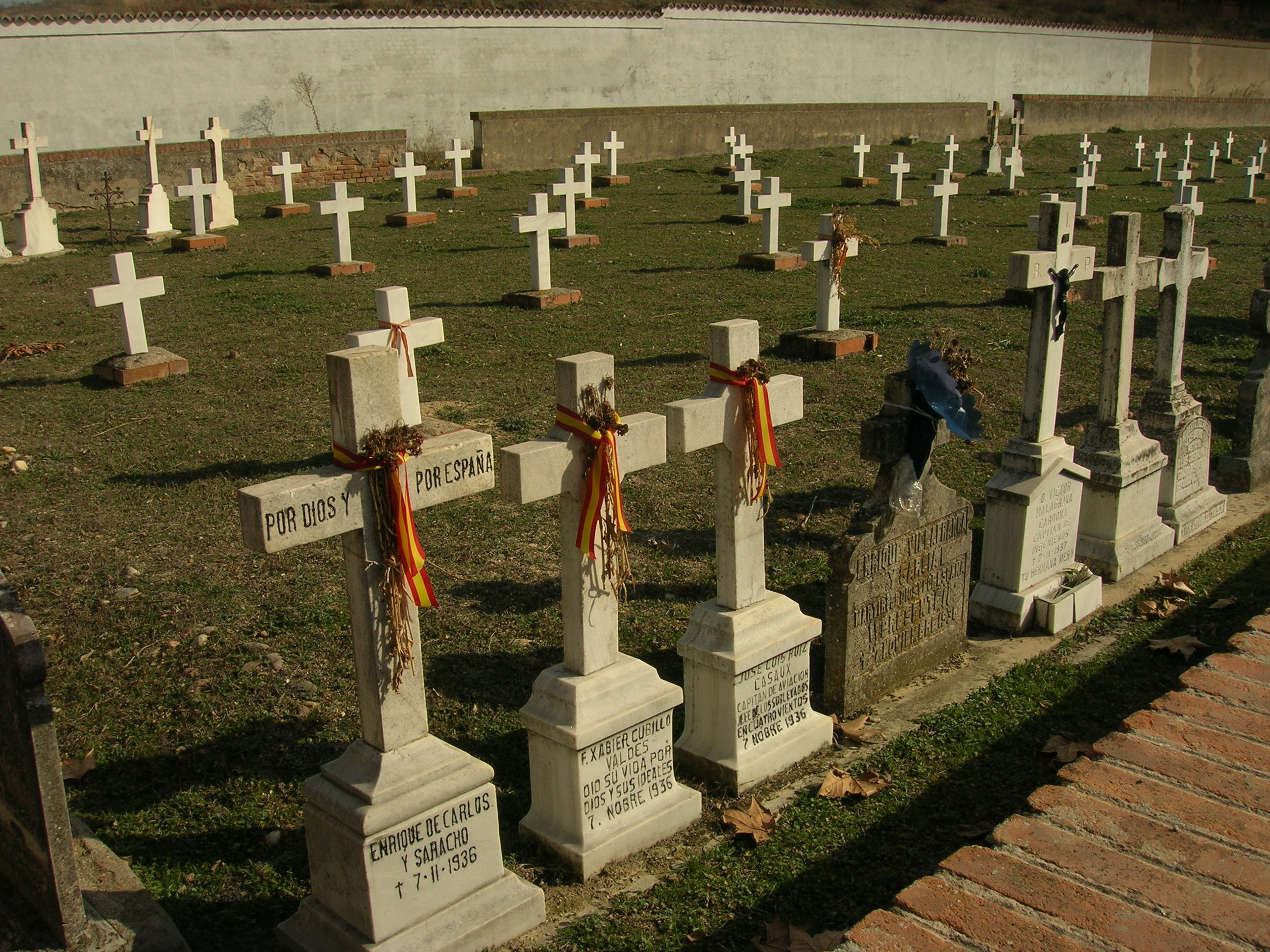 Vista de lápidas en la Fosa II del cementerio de las Matanzas de Paracuellos, entre ellas, las del capitán José Luis Ruiz-Casaux López de Carvajal, capitán de Aviación, jefe de los sublevados en el aeródromo de Cuatro Vientos, uno de los nombres utilizados en diversos medios de comunicación y campaña de agitación durante la llamada "guerra de las esquelas" [1] en noviembre de 2006